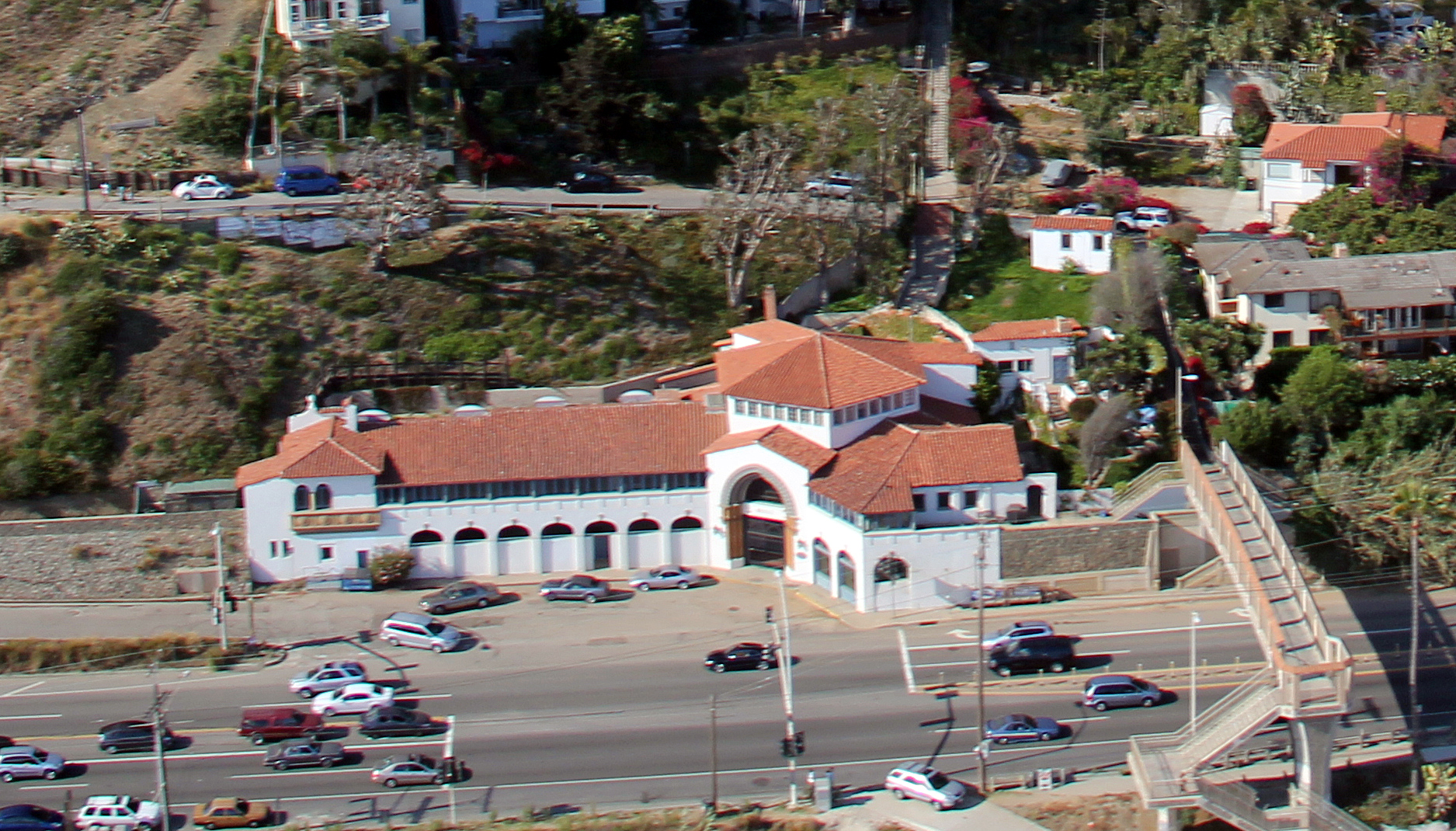 Paulist Productions Pacific Palisades